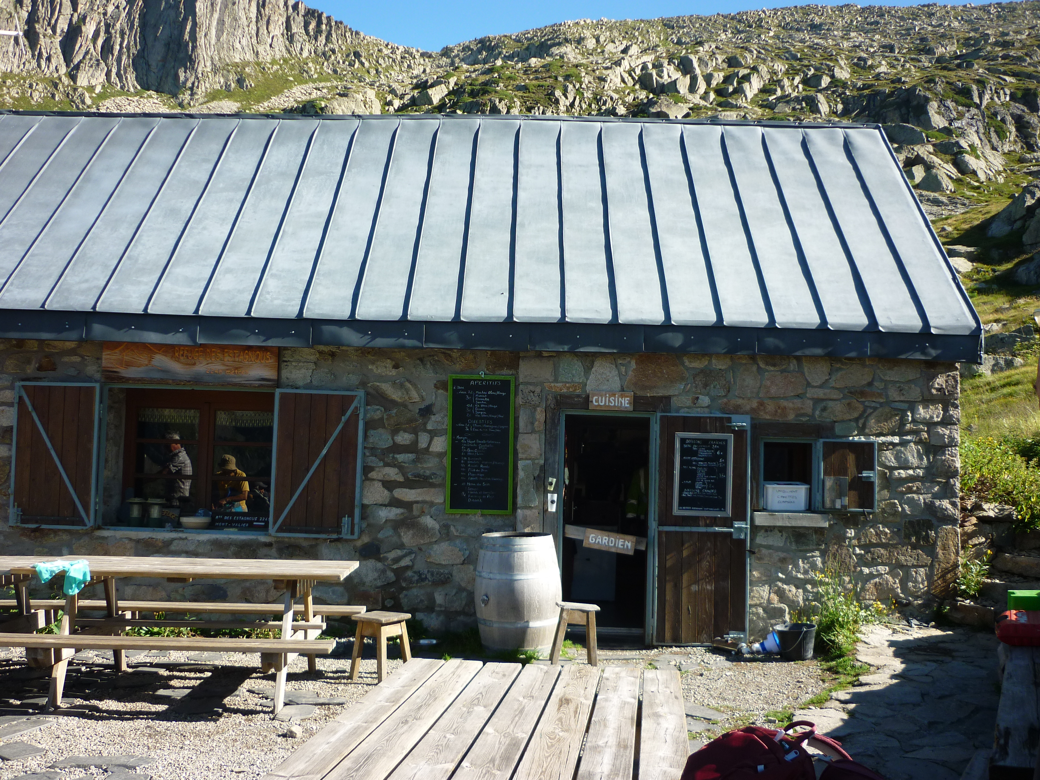 Photo du Refuge des Estagnous